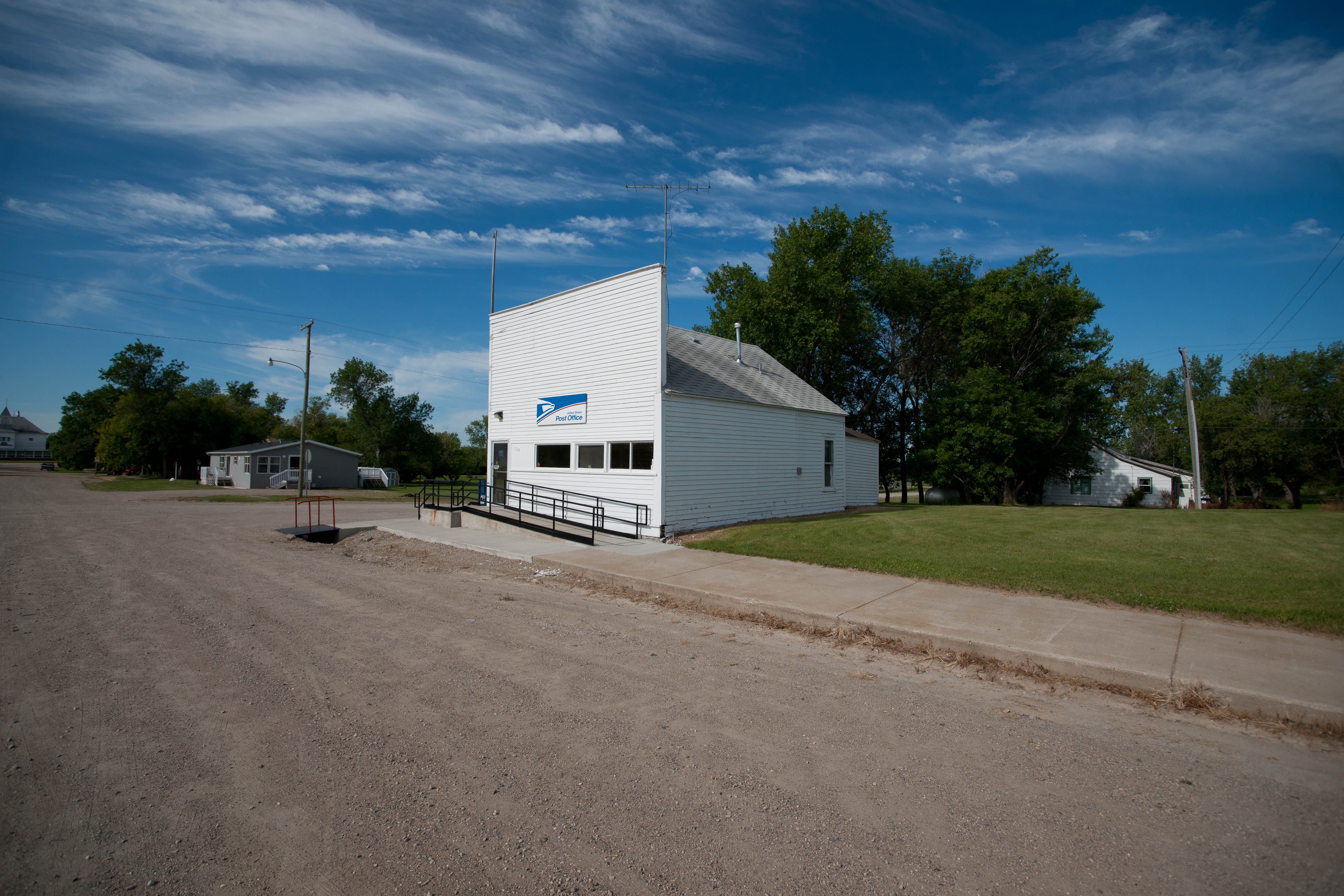 Egeland, North Dakota